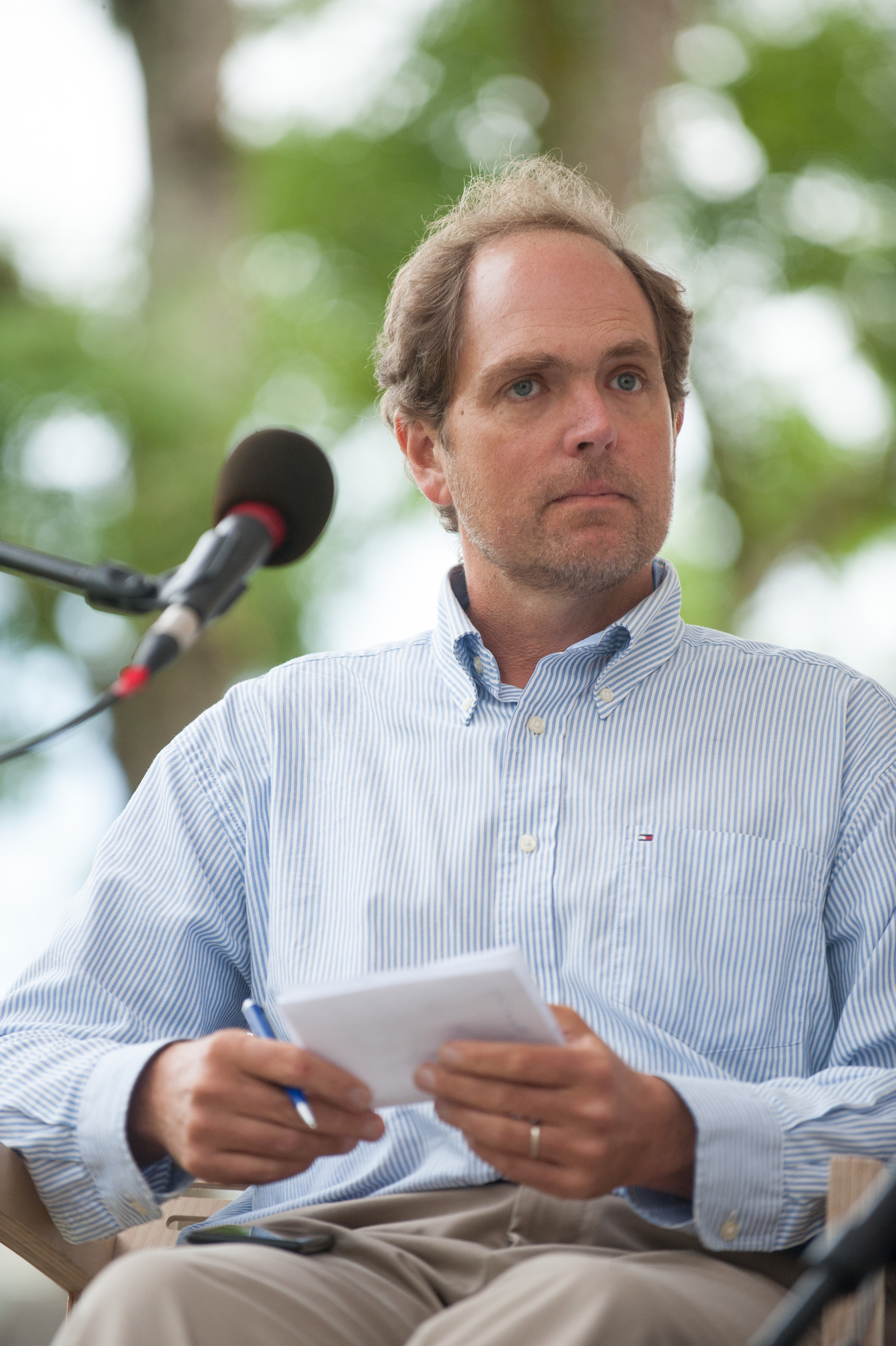 Arvamusfestival 2014: "Eesti julgeolek: kuidas ja mille eest"